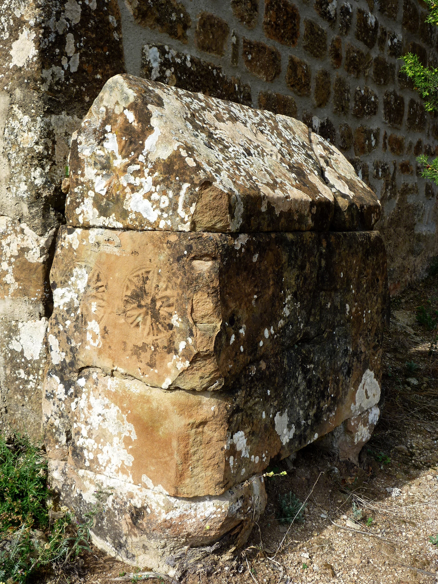 Església de Sant Pere del Pujol (Torrefeta i Florejacs): sarcòfag